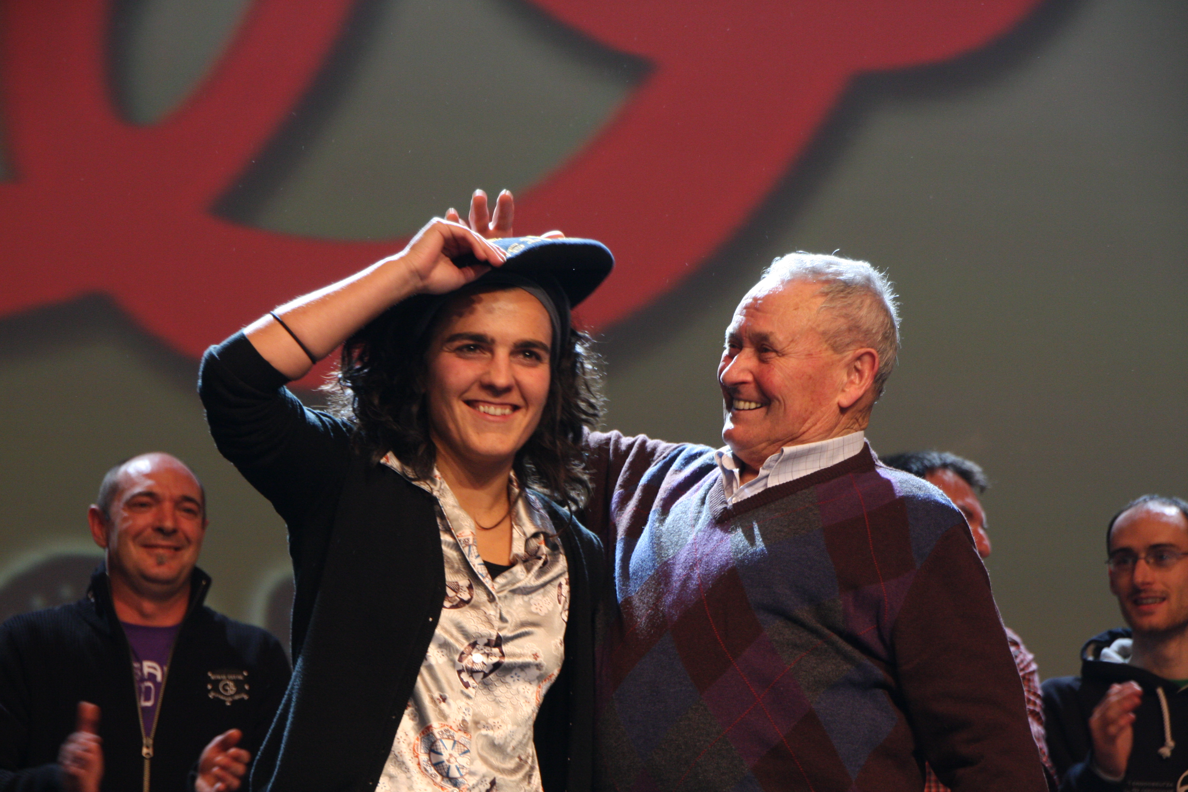 Joxe Agirrek 2009ko Bertsolari Txapelketa Nagusiko txapela jartzen dio Maialen Lujanbiori.